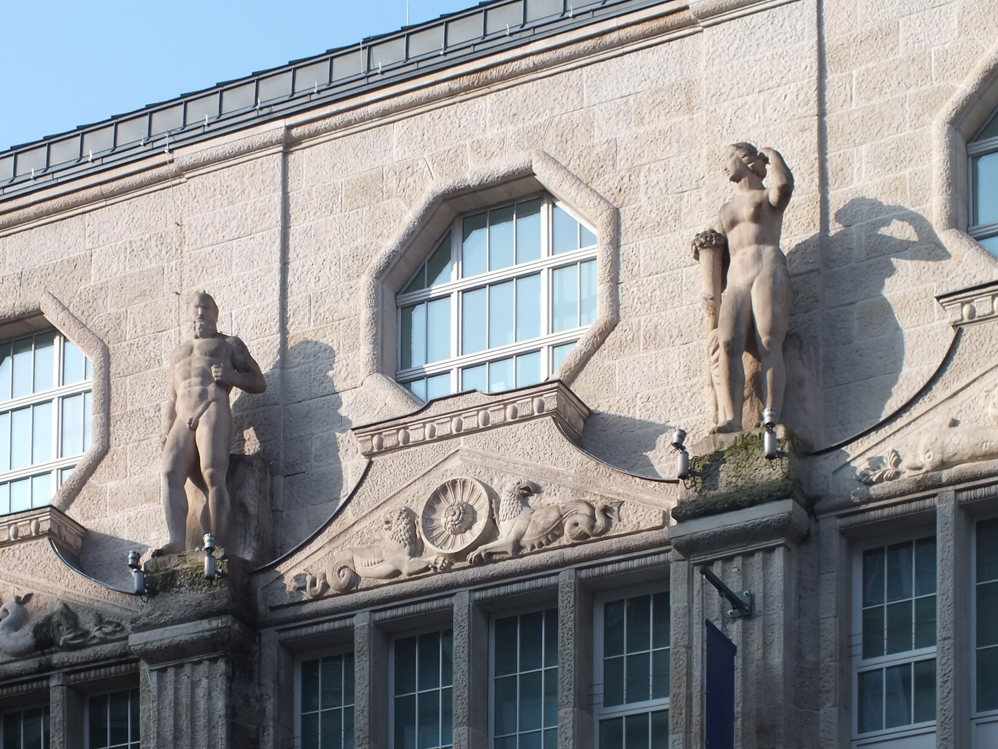 Bauschmuck am Kaufhaus Karstdt in Leipzig